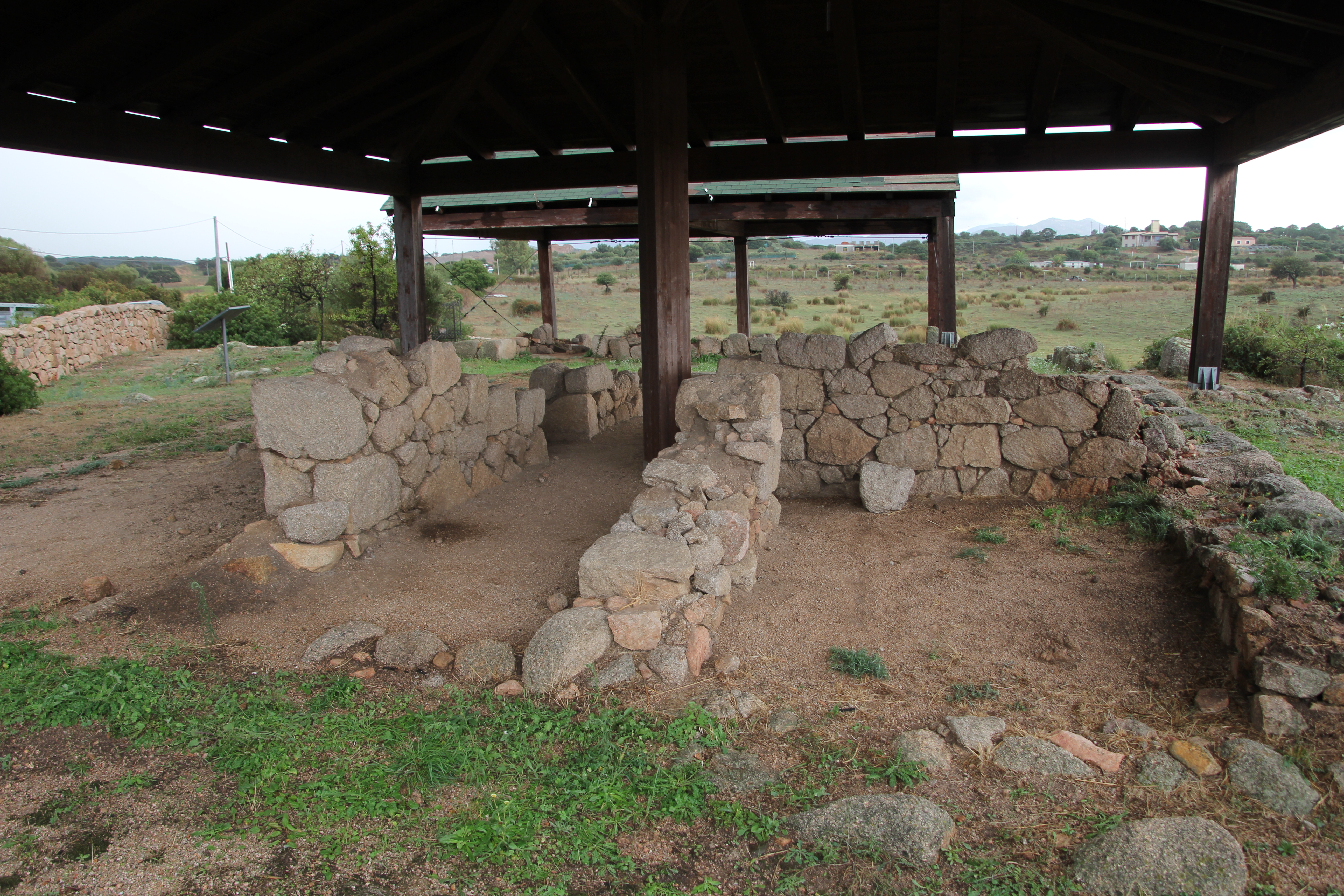 Olbia, fattoria romana di S'Imbalconadu